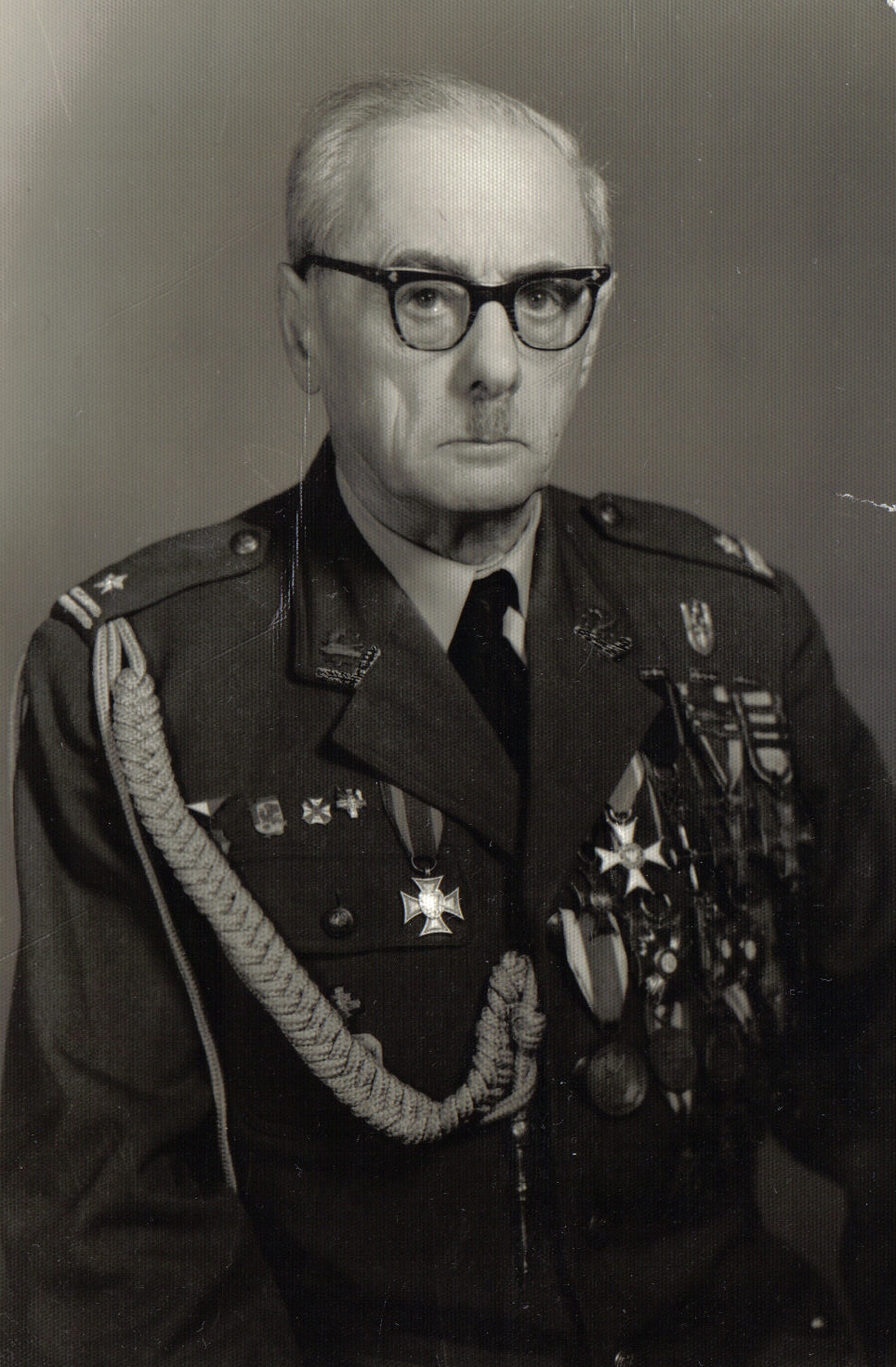 Tadeusz Wacław Dobrzyński w mundurze wojskowym.